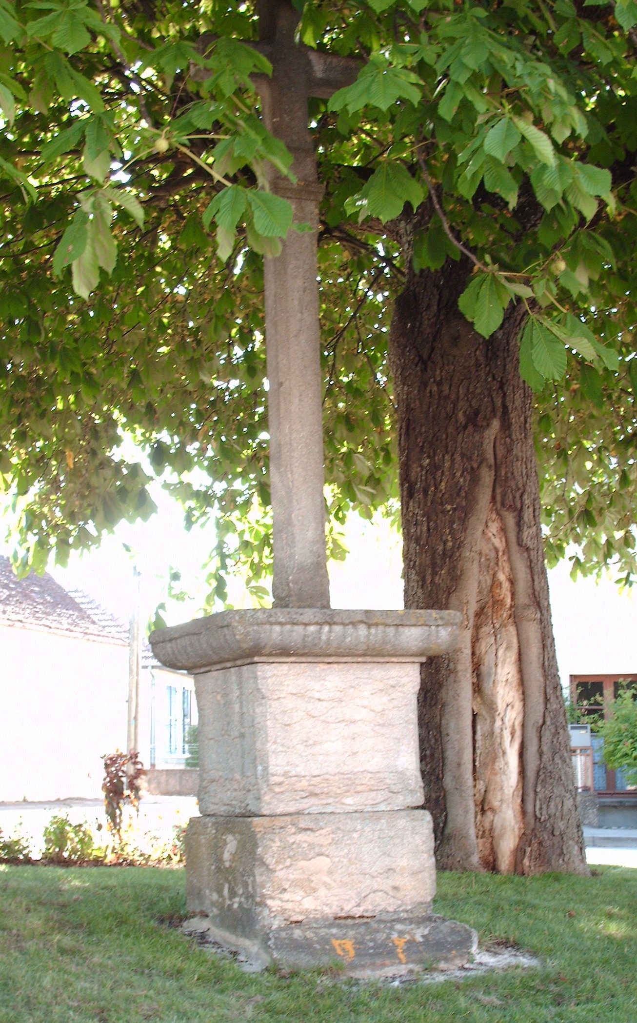 Calvaire de la place Saint-Eloi